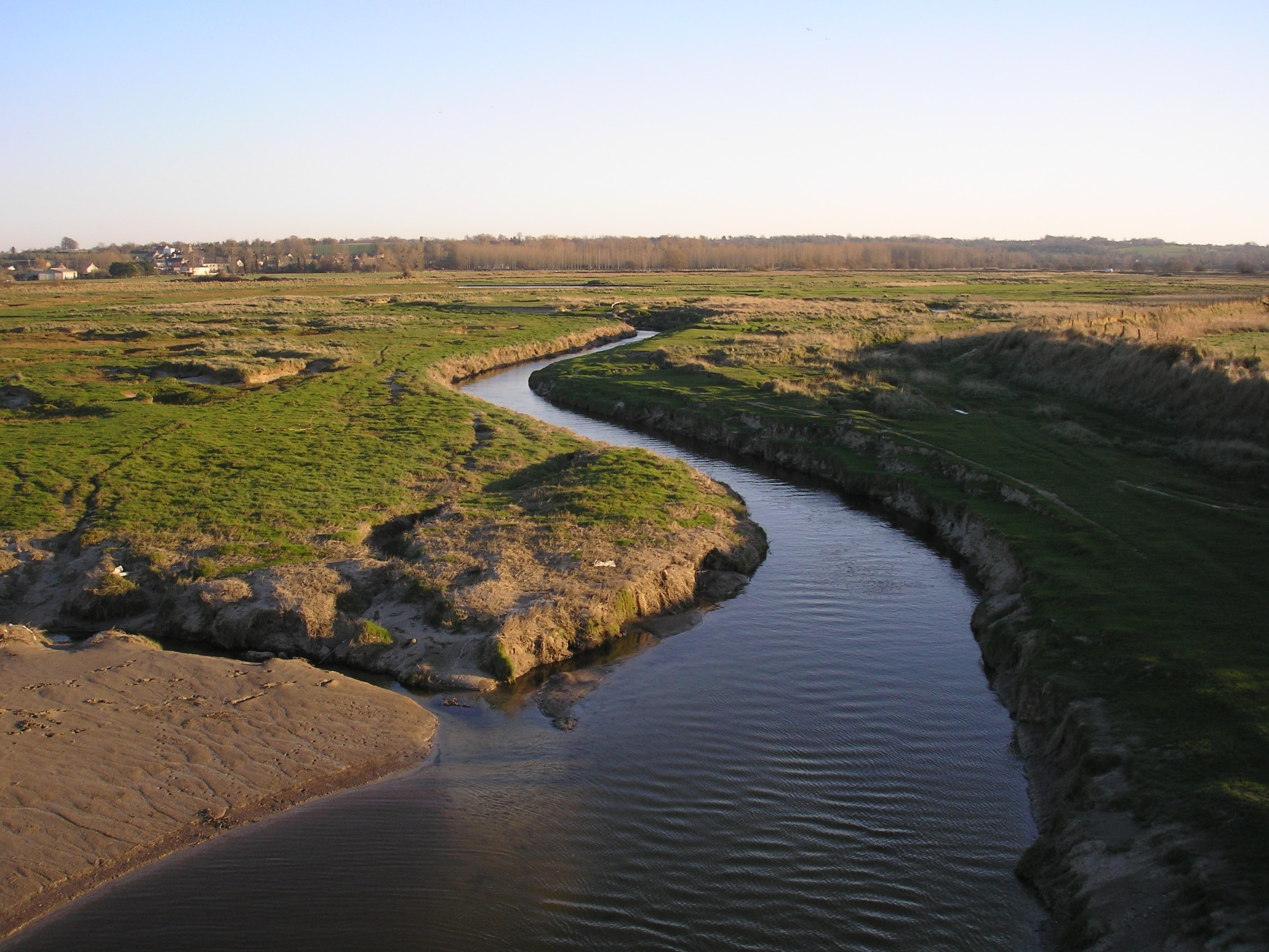 Bréhal (Normandie, France). La Vanlée et le havre de la Vanlée.